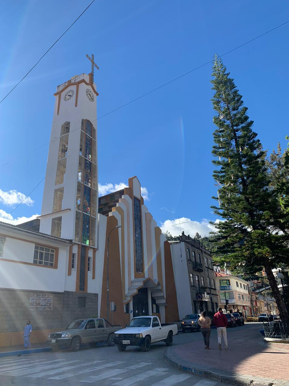 Iglesia Matriz de Paute ubicada en el cantón Paute de la Provincia del Azuay, Ecuador.